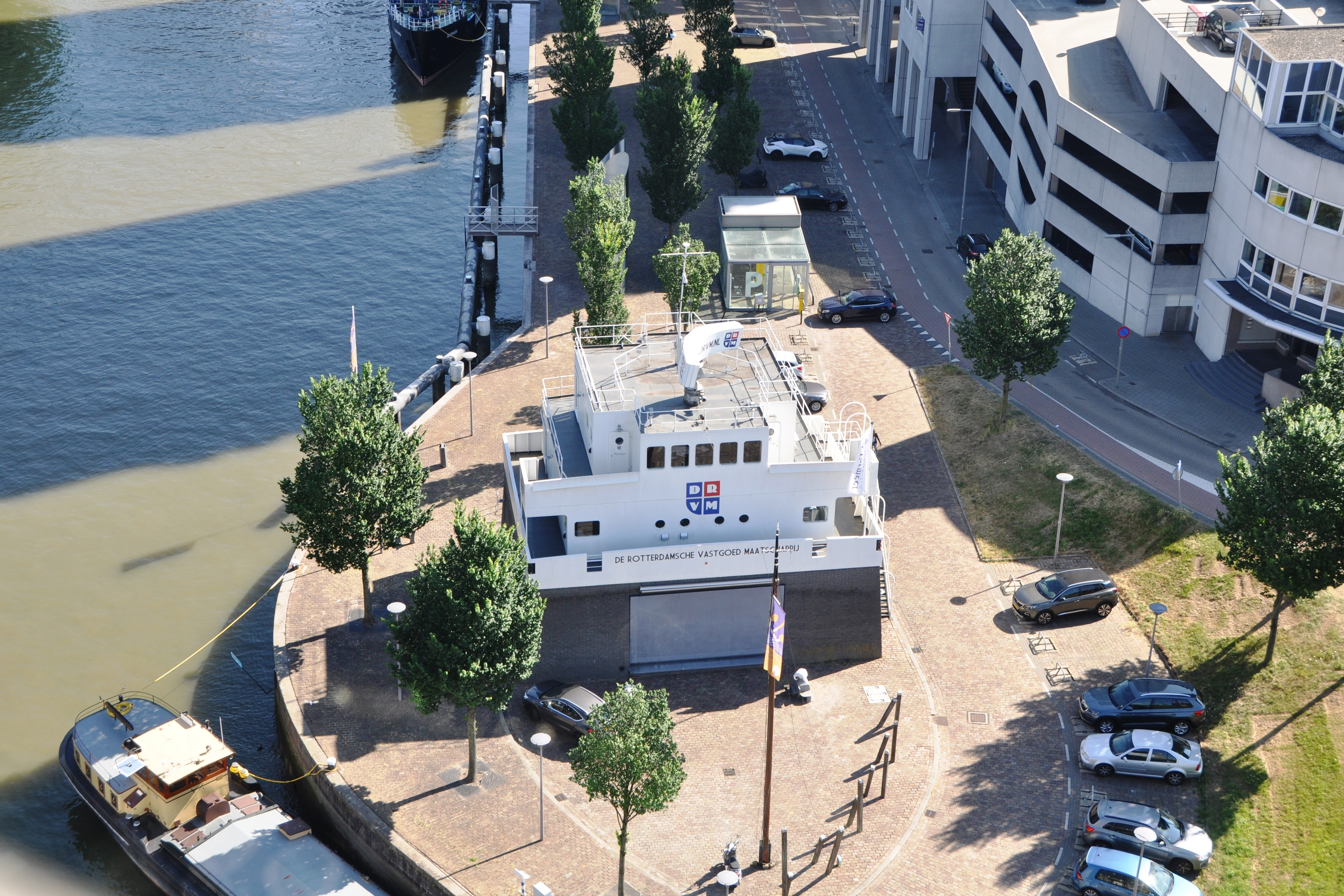 De REGGESTROOM op de Nieuwe Maas voor Rotterdam.